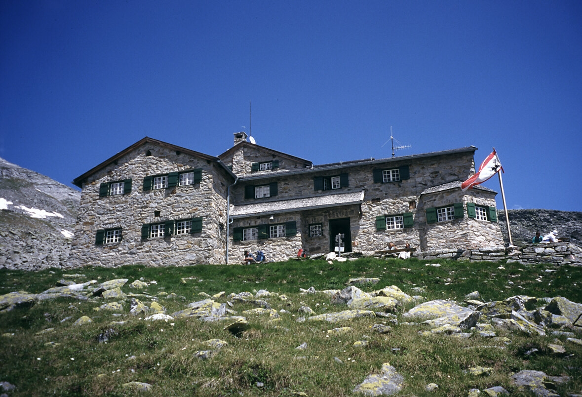 Friesenberghaus 1998